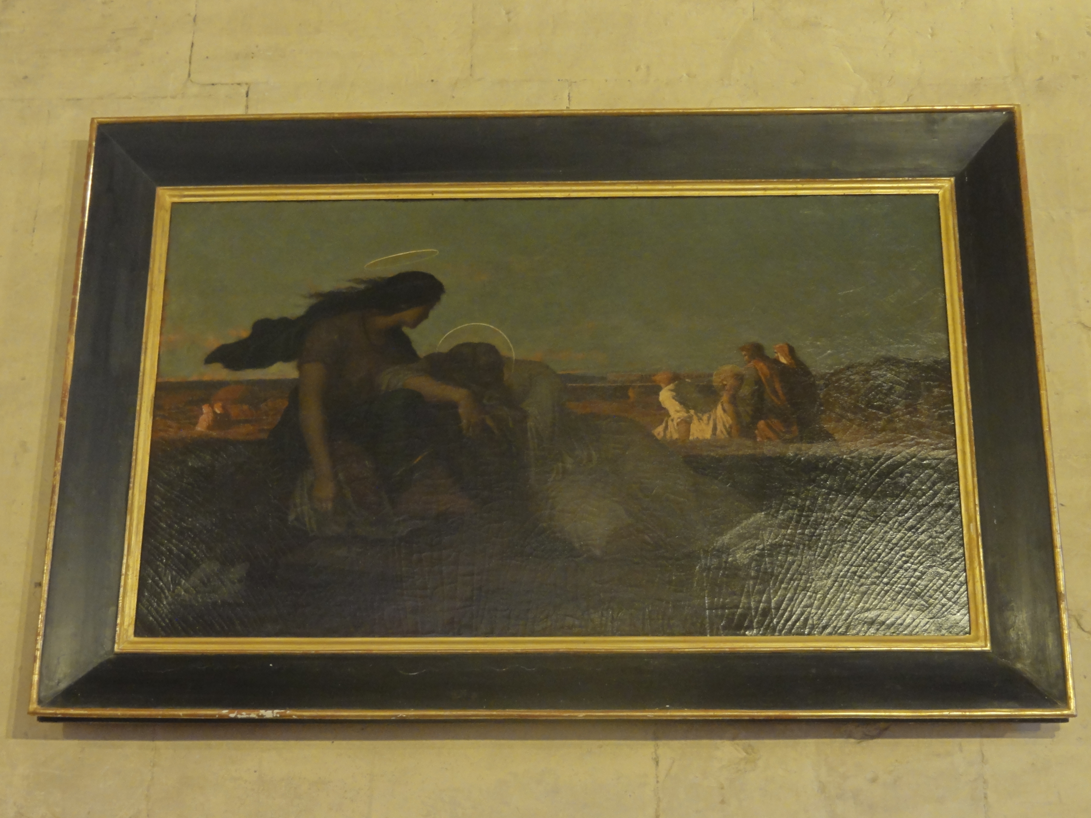 Tableau - Le Christ porté au sépulcre, par Yan Dargent.